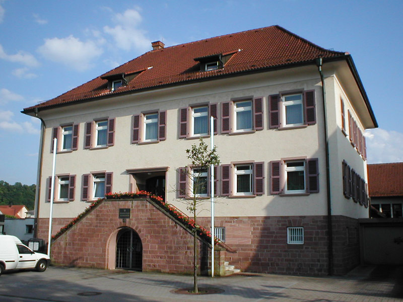 Rathaus von Haßmersheim